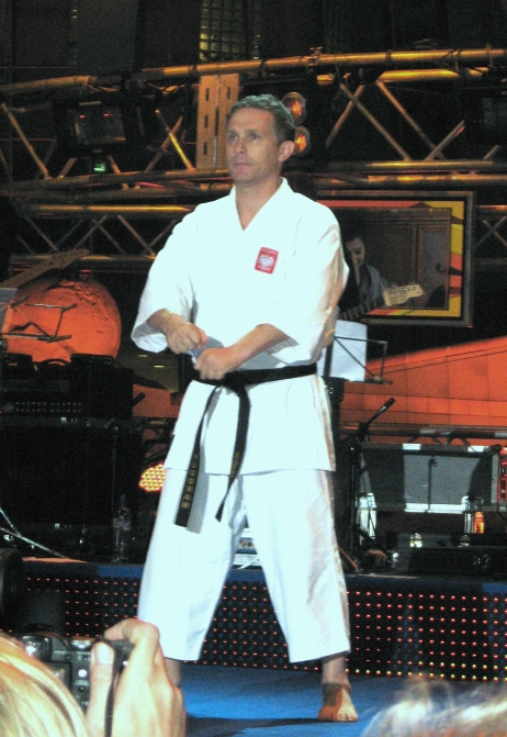 Robert Moskwa podczas koncertu jesiennej ramówki TVP, Warszawa 2009